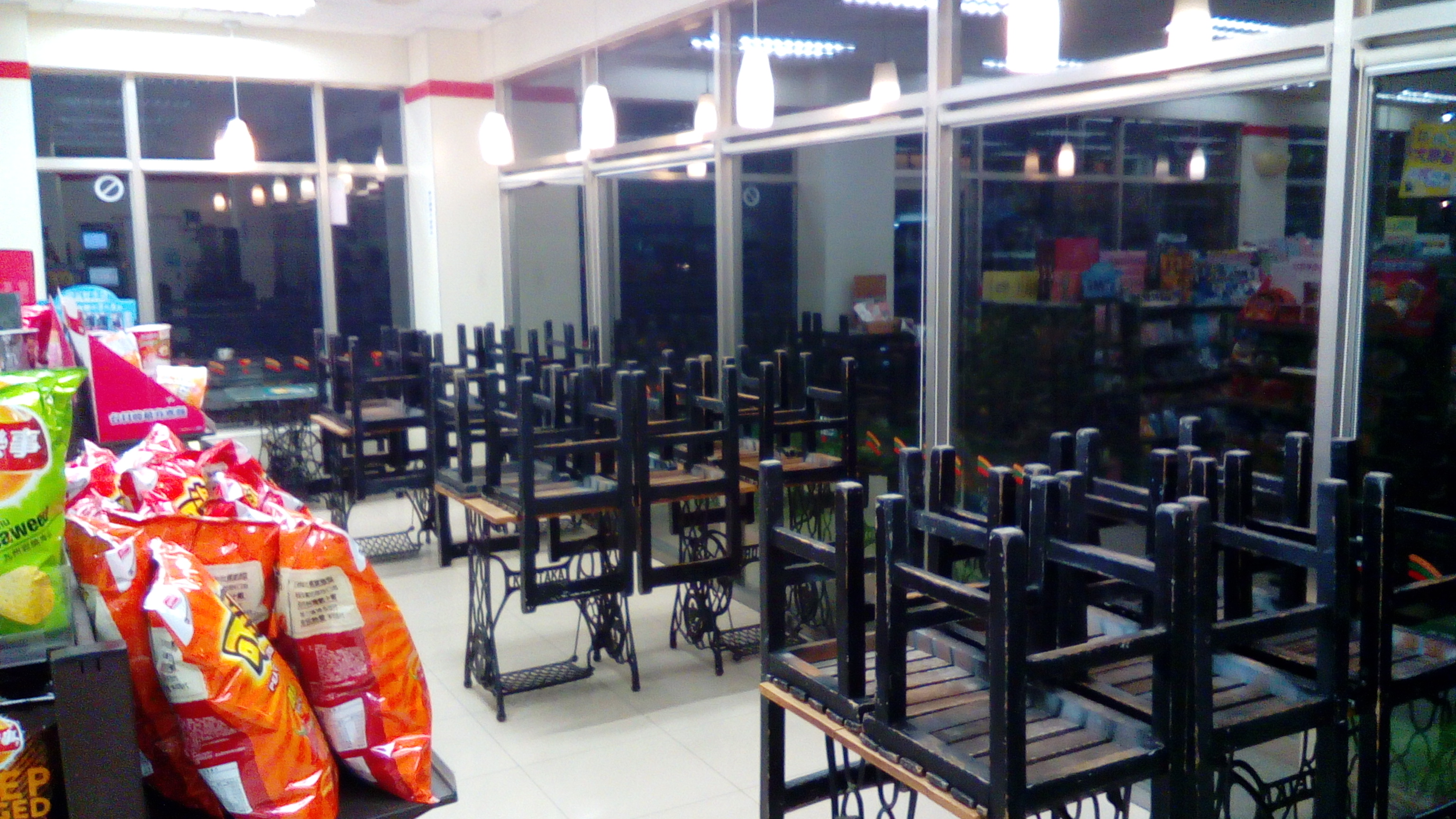 統一超商蓮營門市內部夜景。